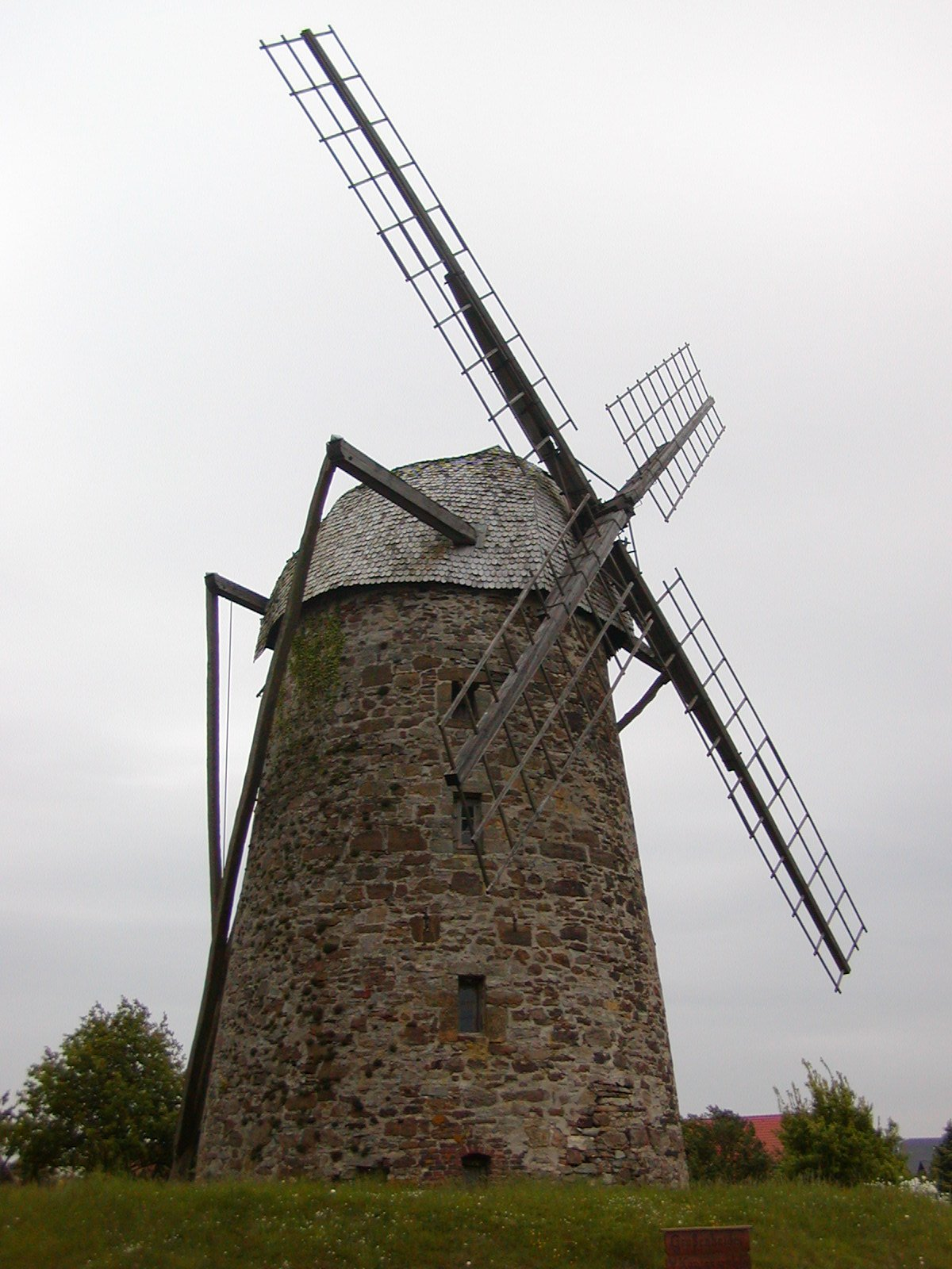 Großenheider Königsmühle bei Minden-Todtenhausen, Nordrhein-Westfalen. Die Mühle ist Teil der Westfälischen Mühlenstraße. Die Großenheider Königsmühle in Todtenhausen ist ein um 1731 gebauter Wall-Holländer mit einem leicht konischen Bruchsteinturm und einem kleinen Erdwall. 1972 erhielt die Mühle wieder Flügel. Diese Flügel sind den letzten Jalousieflügeln nachgebildet. Die Windrosenanlage wurde 1985 durch den ursprünglichen Stert ersetzt.